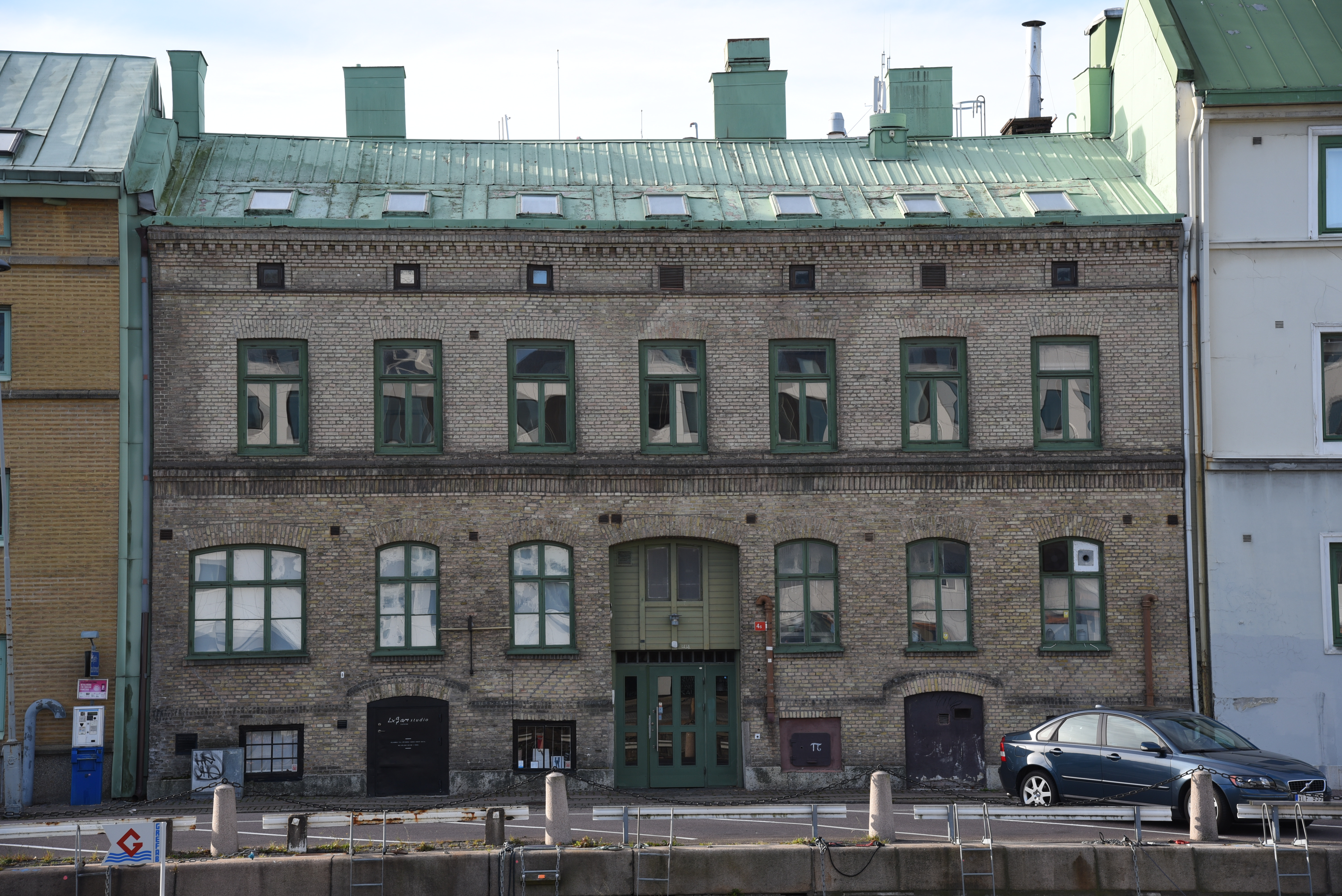 Brogatan 2 i 3 kvarteret Röda Bryggan i stadsdelen Pustervik i Göteborg. Huset uppfört omkring 1860.